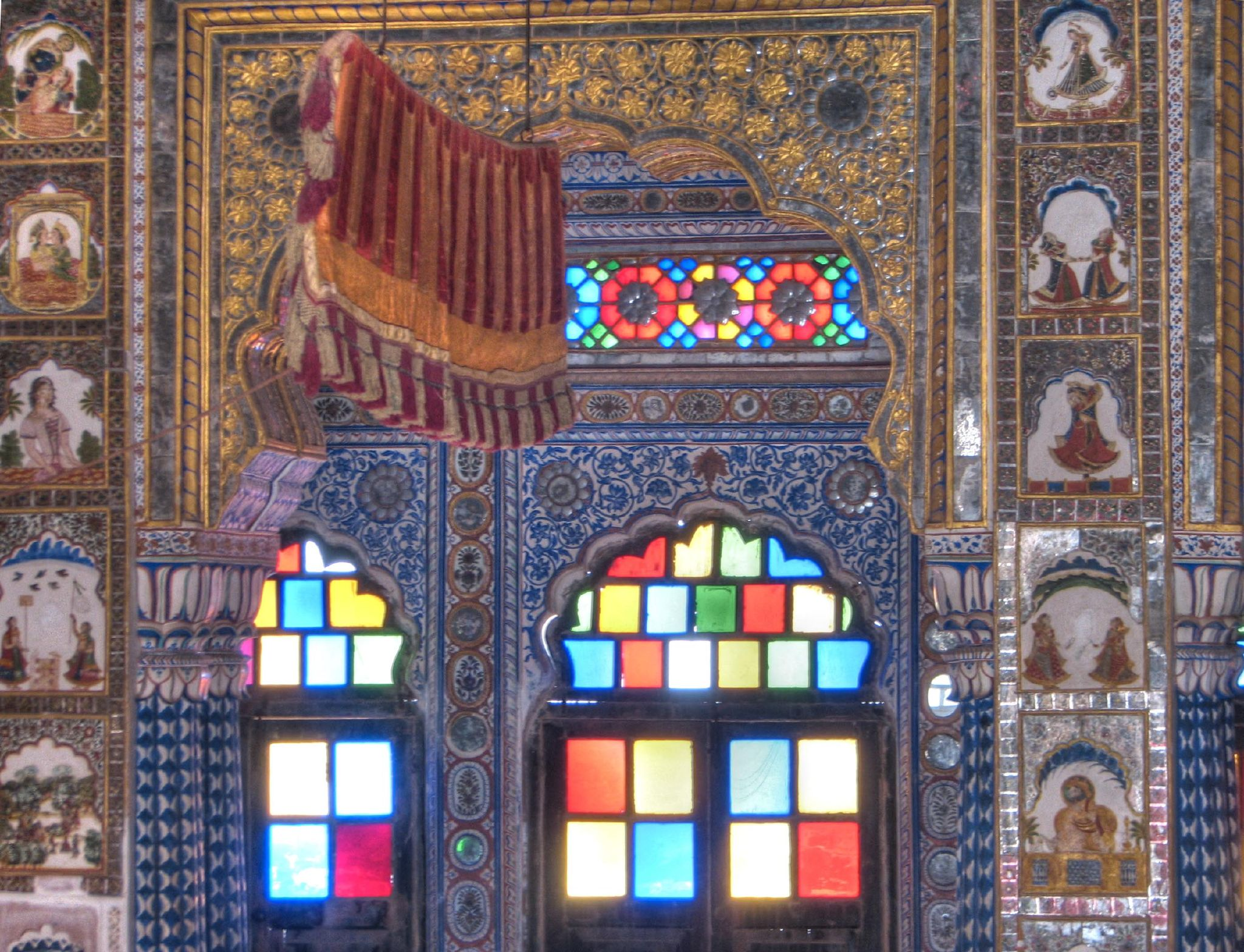 Merhengarh Interior 06 HDR